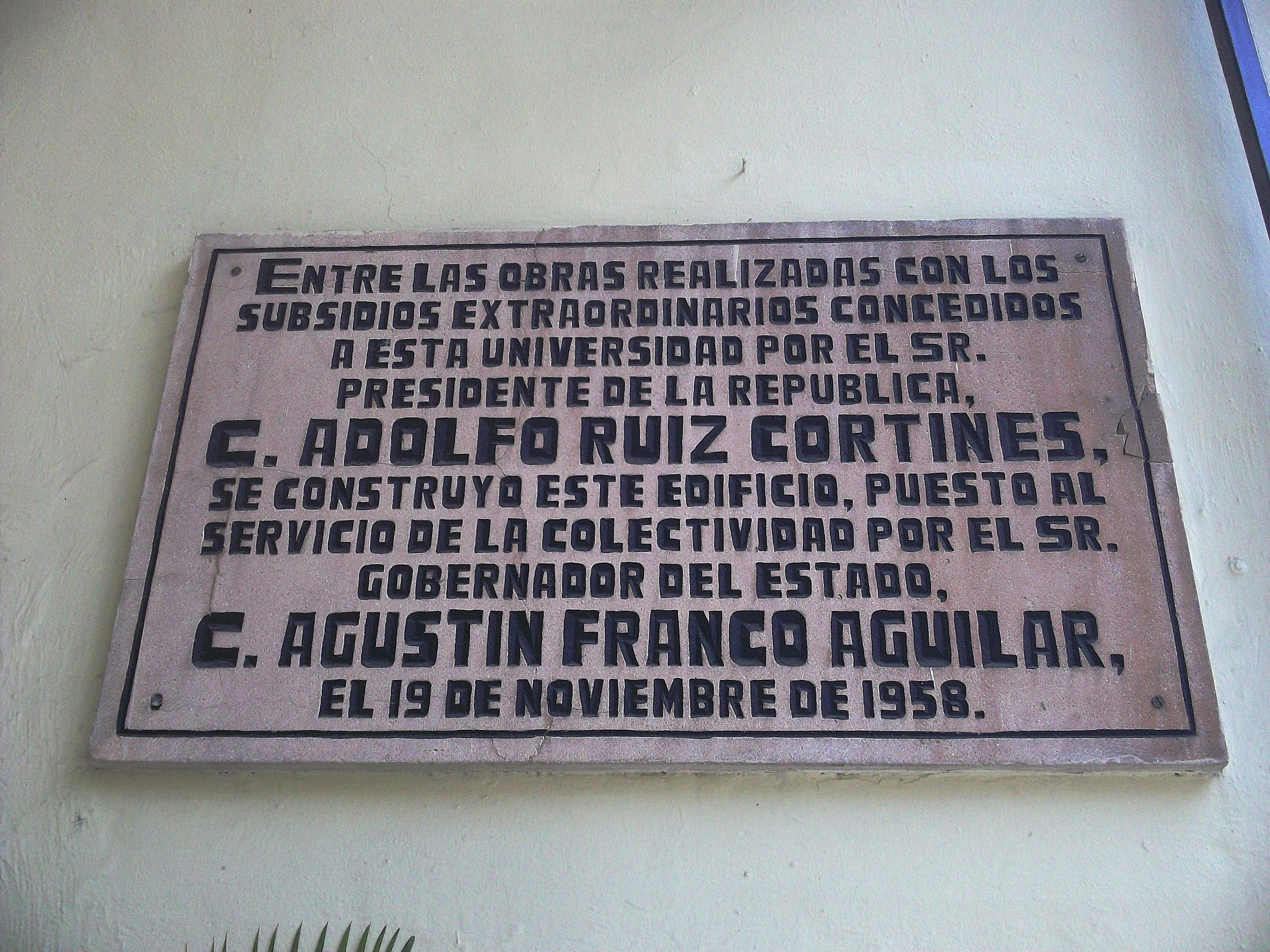 UADY, Mérida, Yucatán.